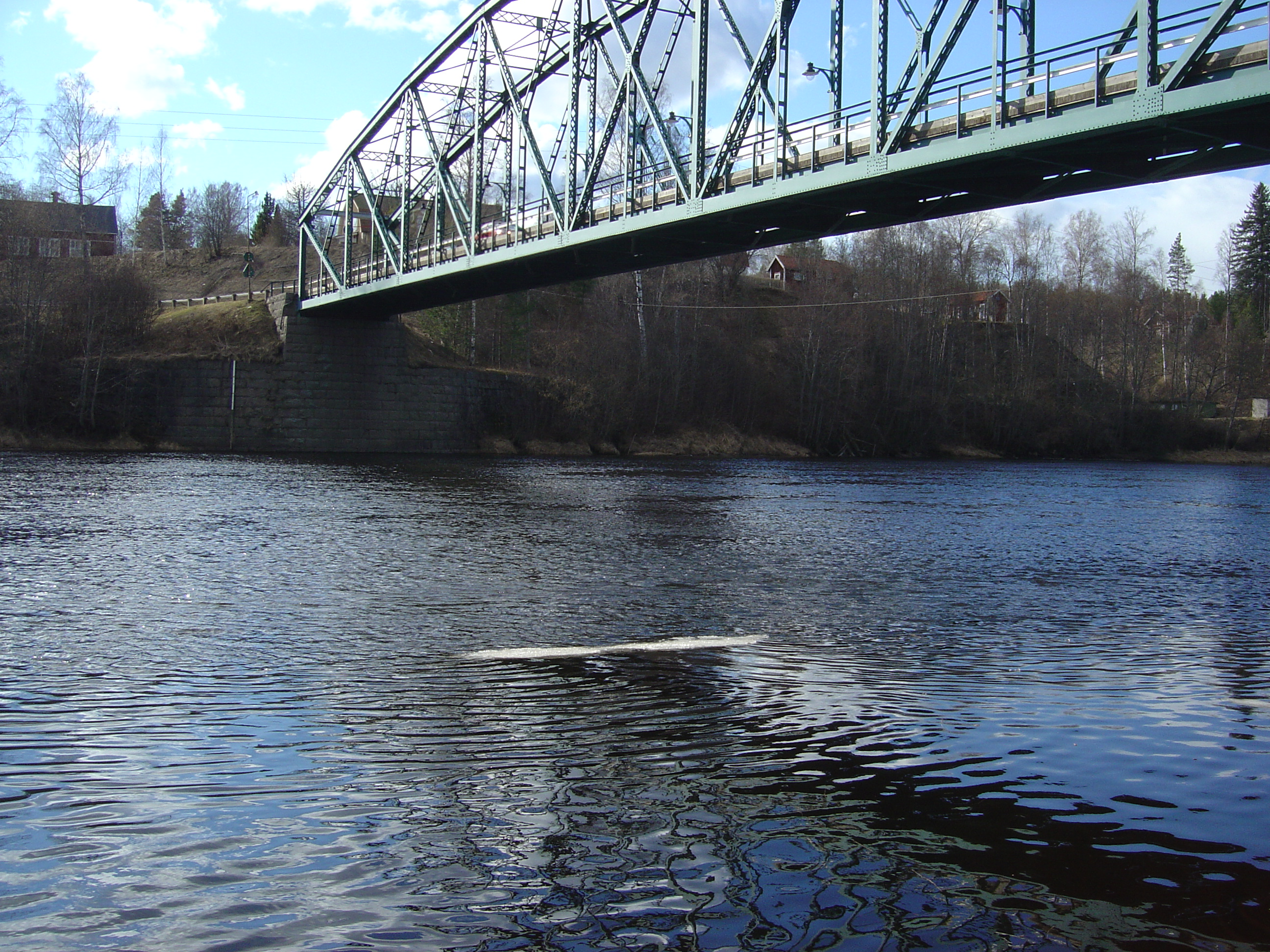 Den sista isen, Klarälven Munkfors kommun i Värmland